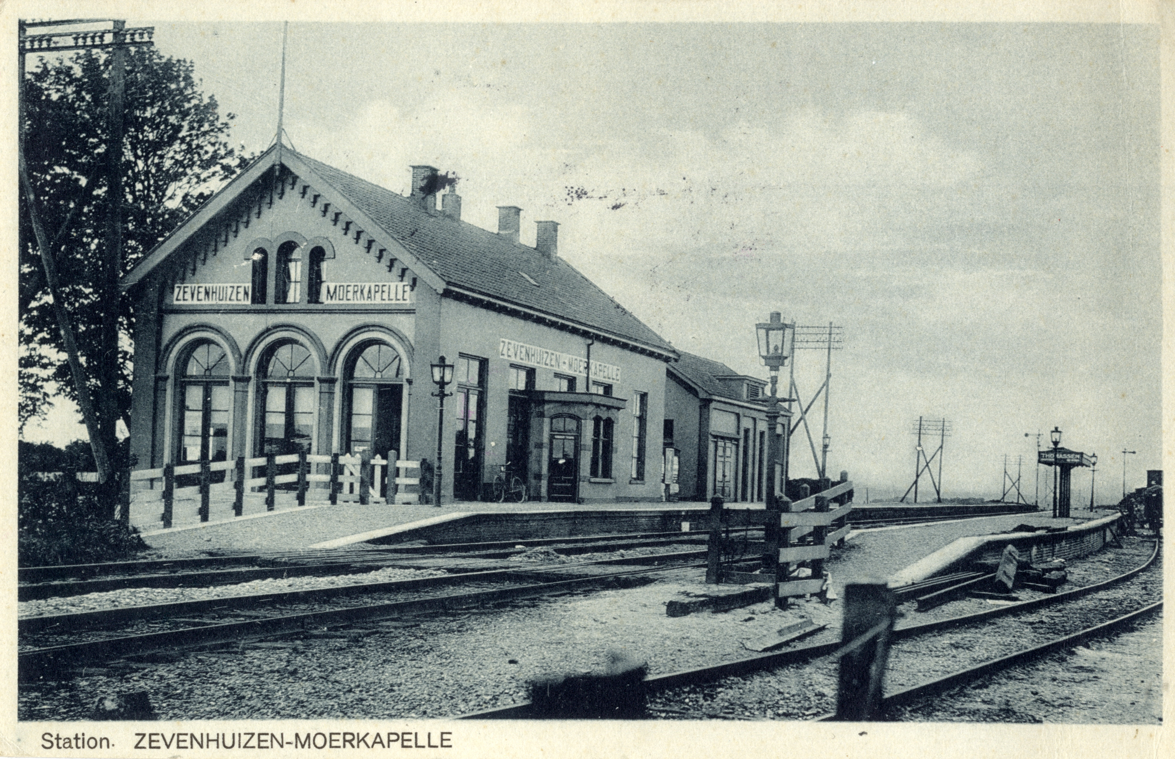 Gezicht op het S.S.-station Zevenhuizen-Moerkapelle te Zevenhuizen.